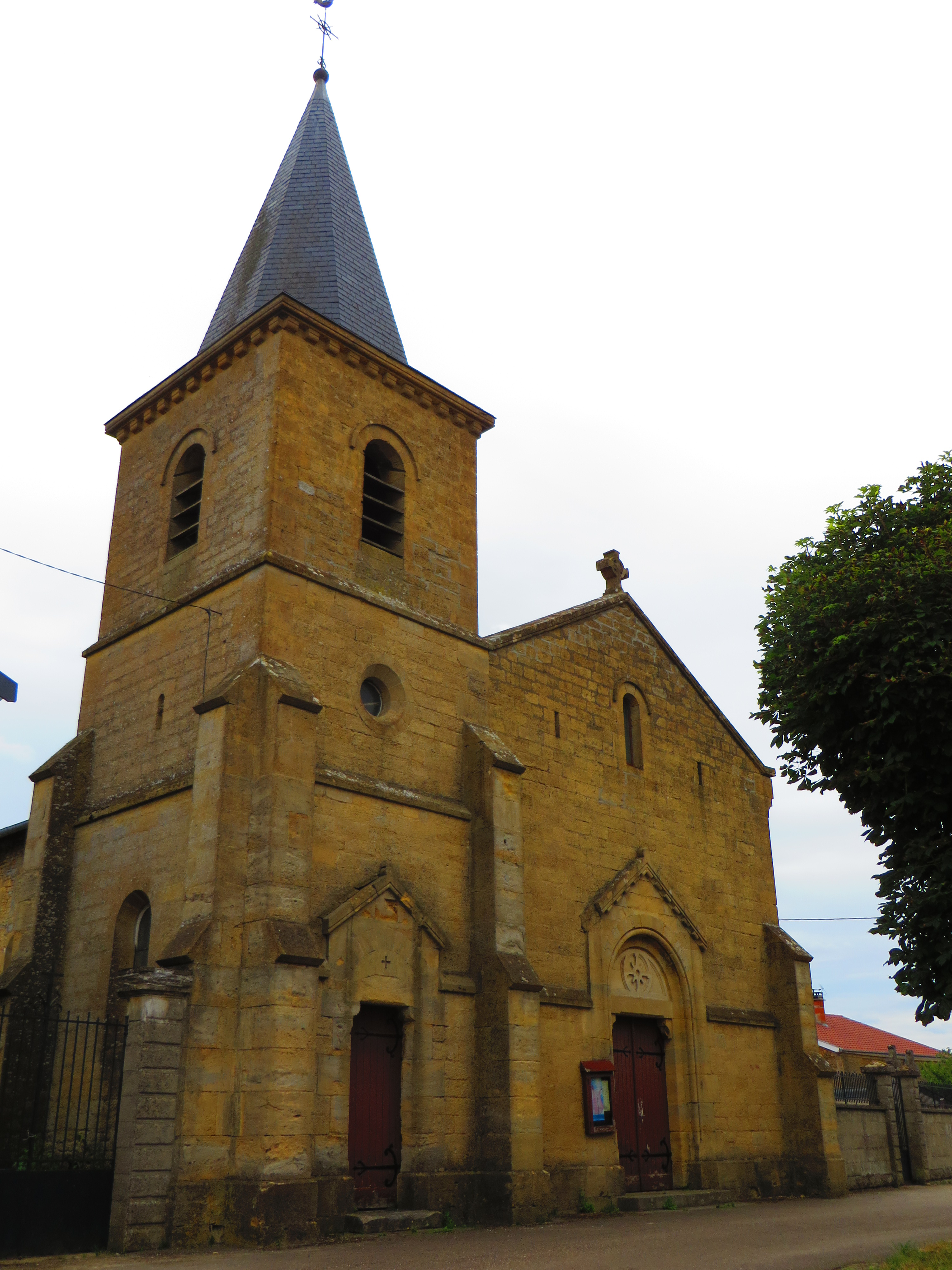 Gouraincourt L'église Saint-Martin